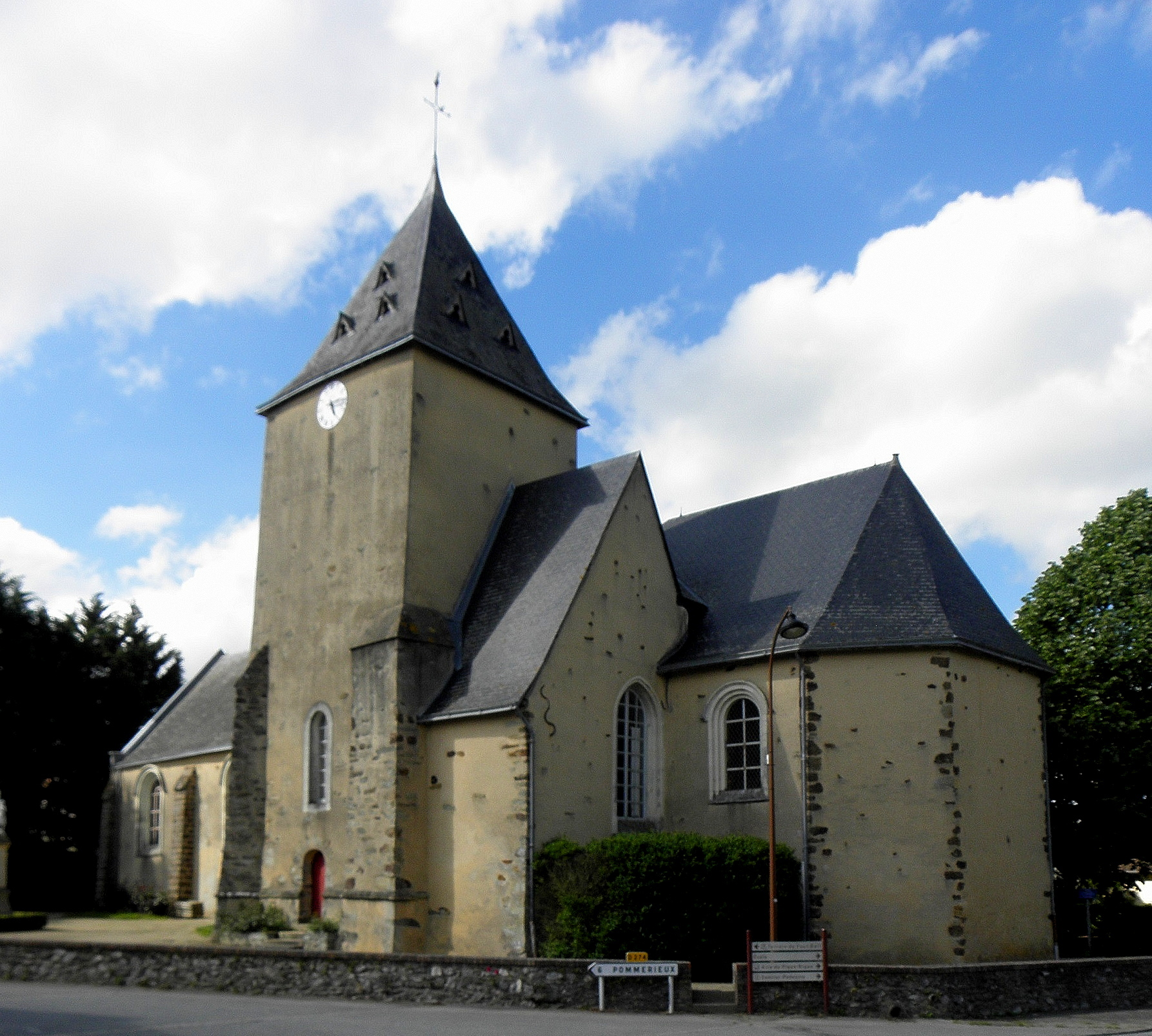 Église Saint-Jean-Baptiste d'Ampoigné (53).